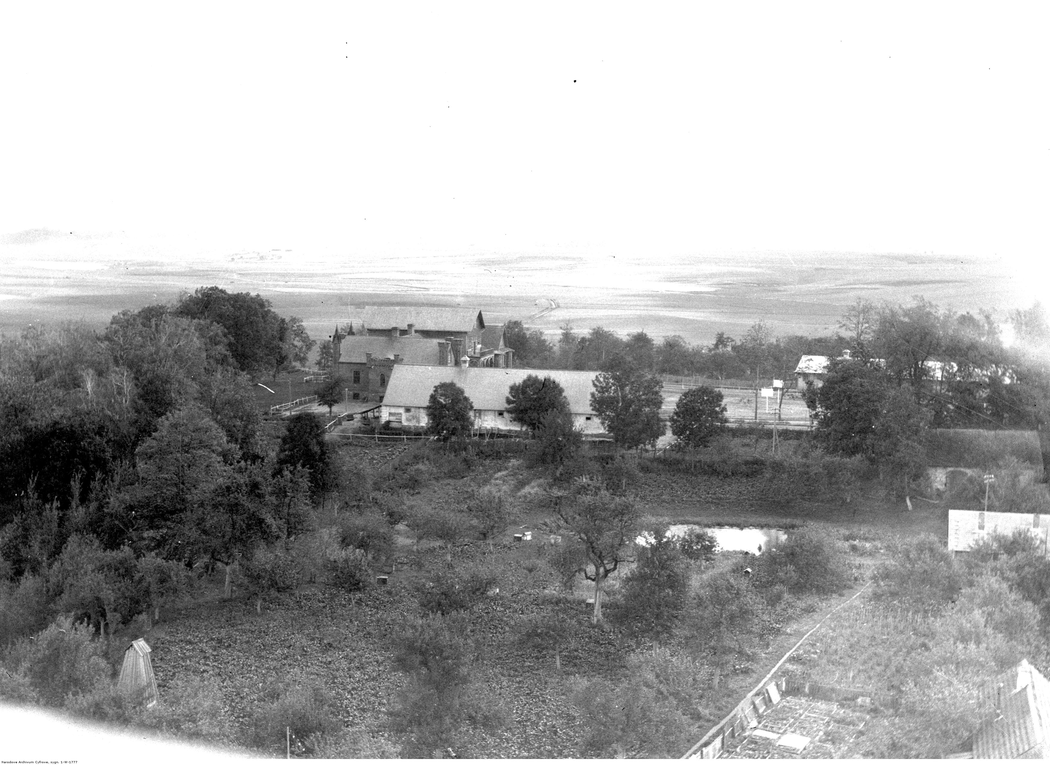 Koszary Szwadronu Kawalerii Korpusu Ochrony Pogranicza w byłym zamku w Druji. Koncern Ilustrowany Kurier Codzienny - Archiwum Ilustracji